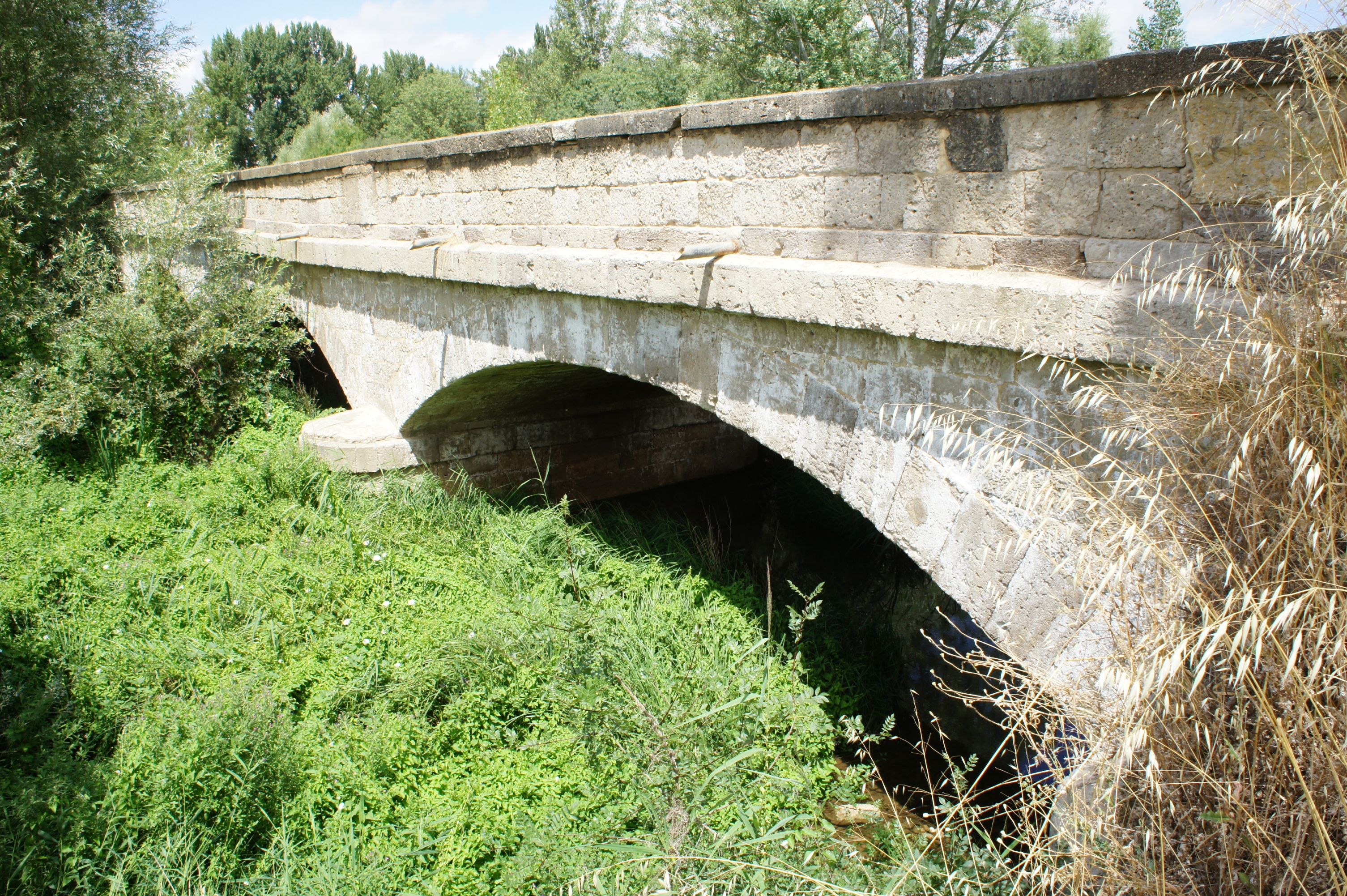 Puente de Melgar de Fernamental